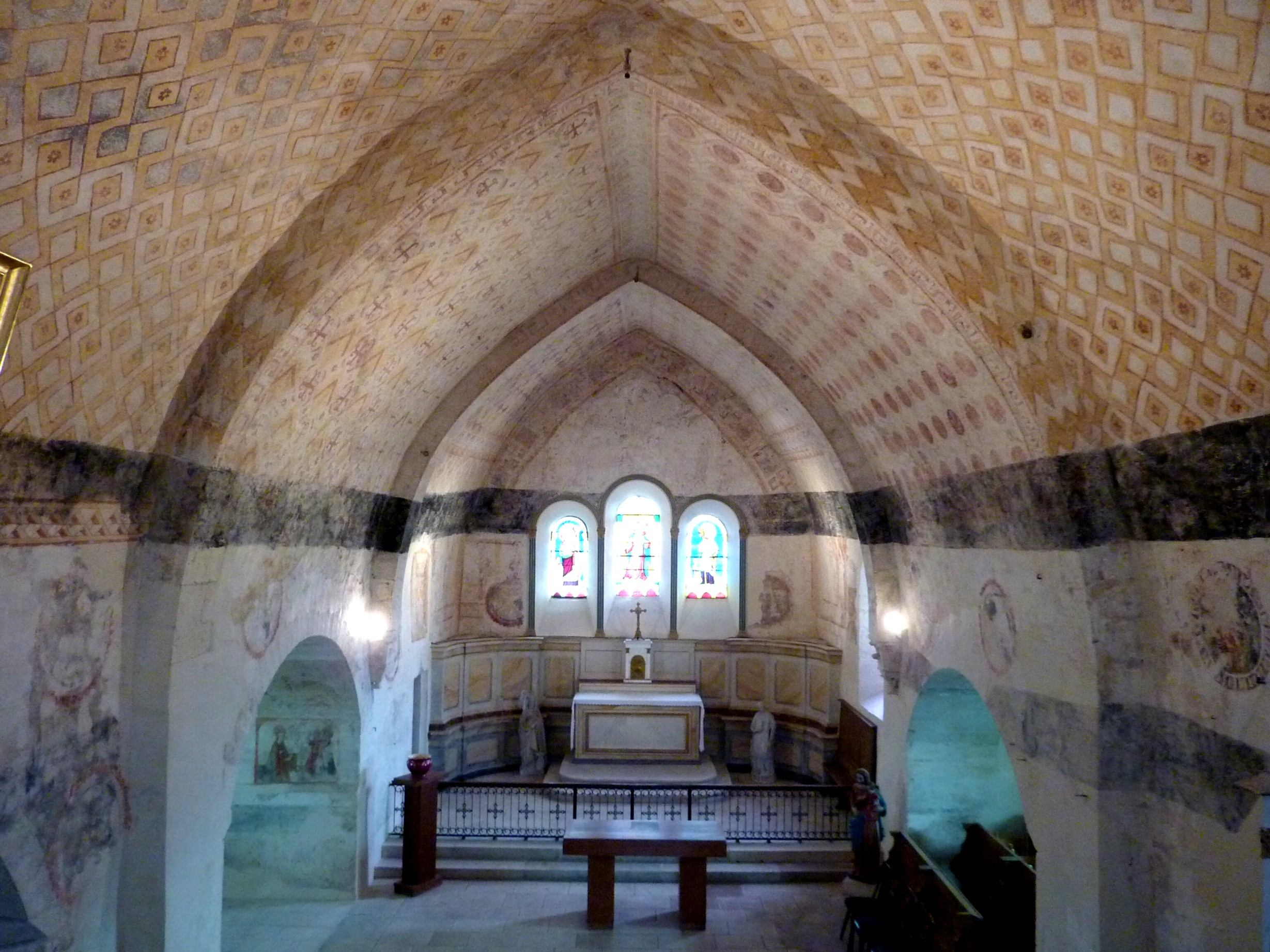 Voûte de l'église et son décor mural